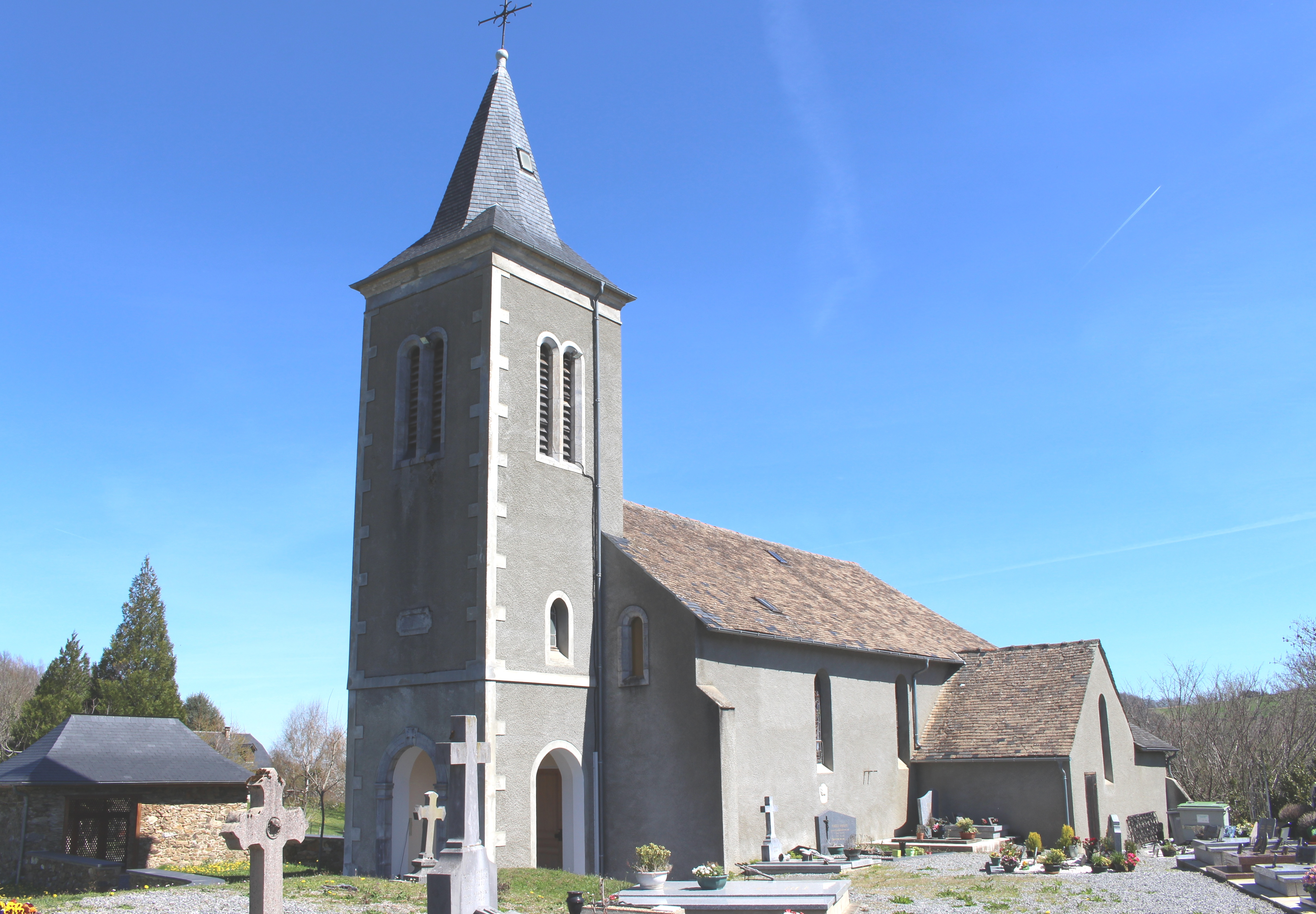 Église Saint Michel de Lahitte-ez-Angles (Hautes-Pyrénées)